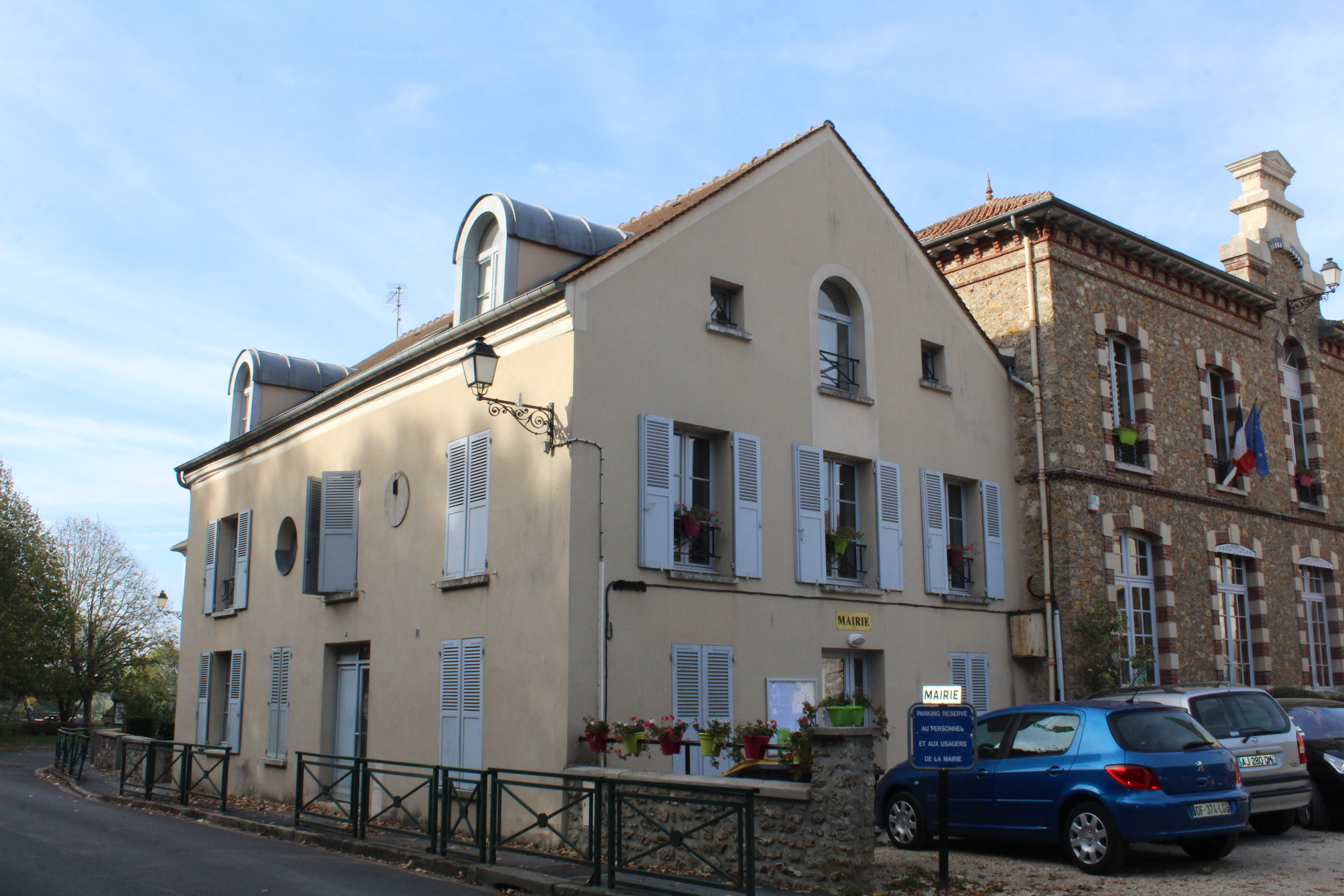 Mairie de Jossigny.